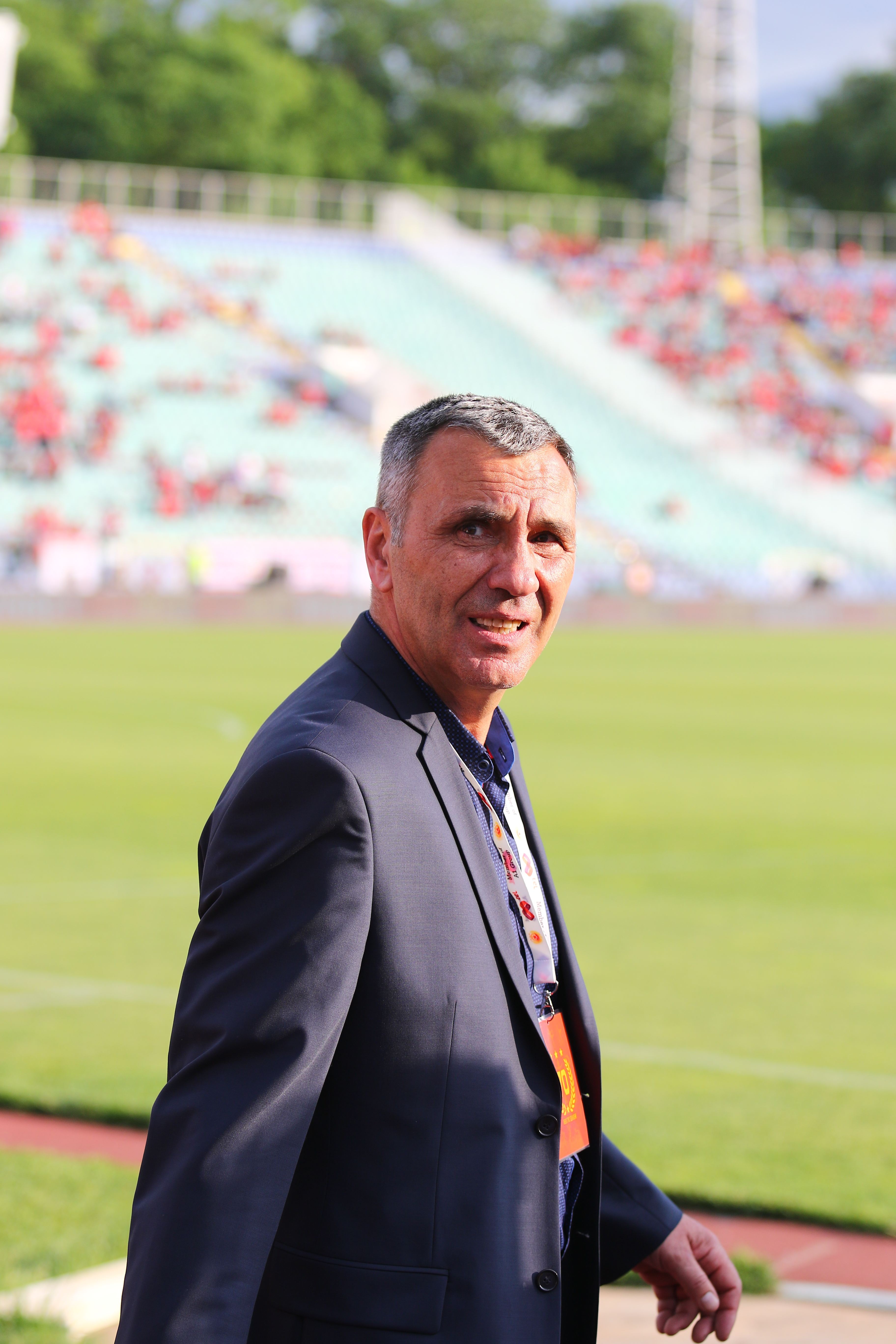 Михаил Таков - бивш български боксьор, понастоящем треньор по бокс